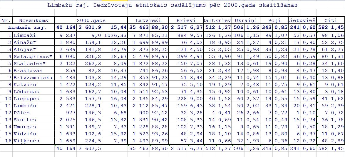 результаты переписи населения Латвии ни 01.04.2000